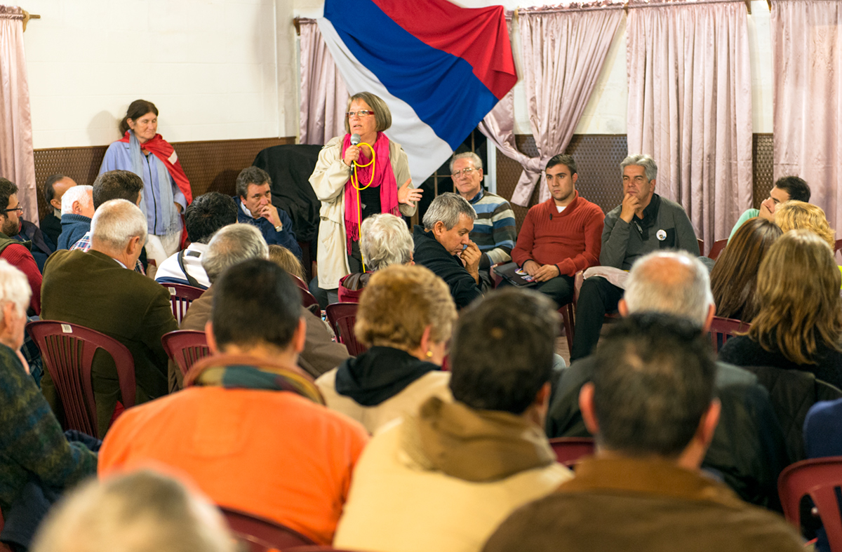 Monica Xavier en una actividad del Frente Amplio organizada por las coordinadoras P y H